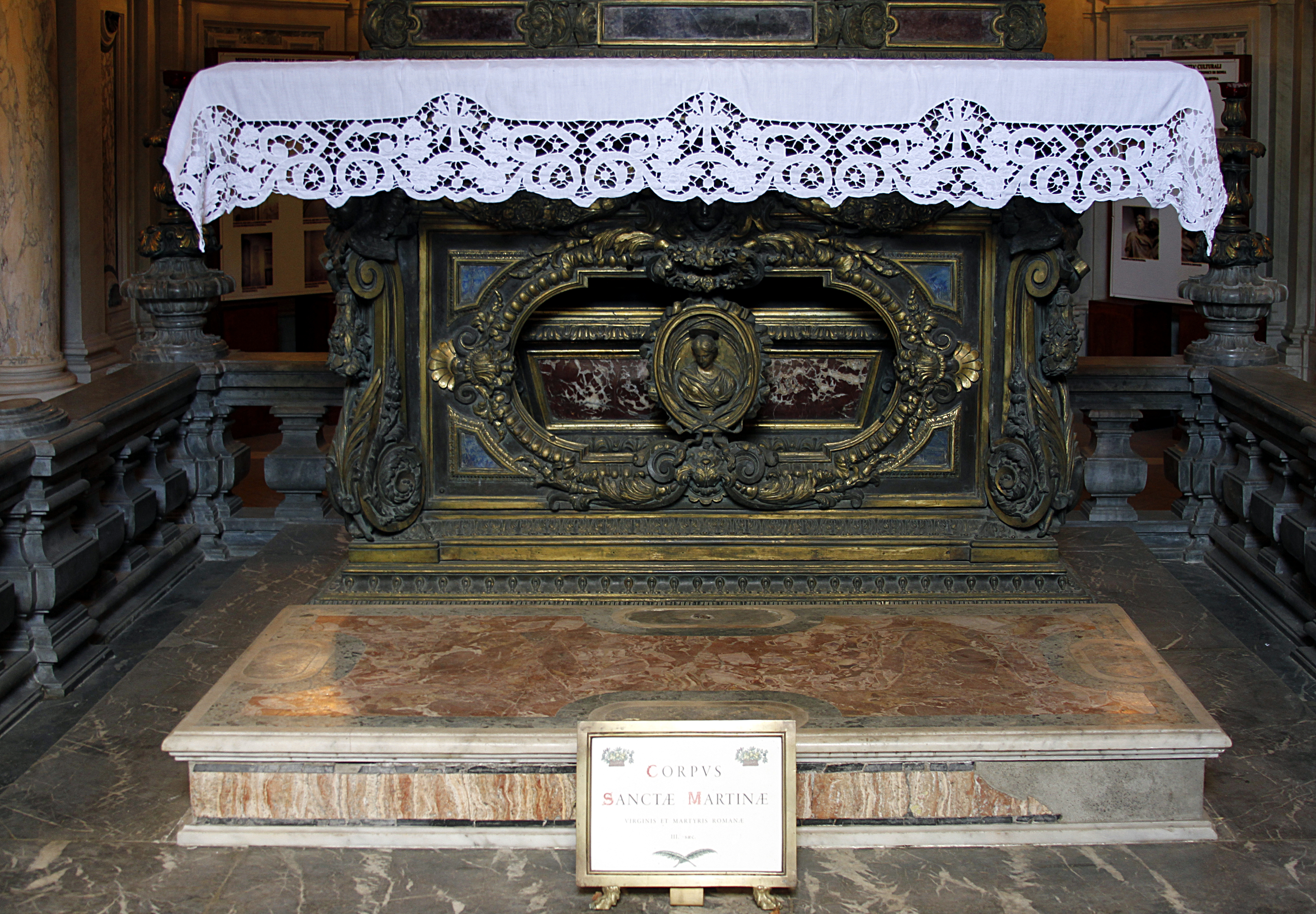 Crypt of Santi Luca e Martina - Rome